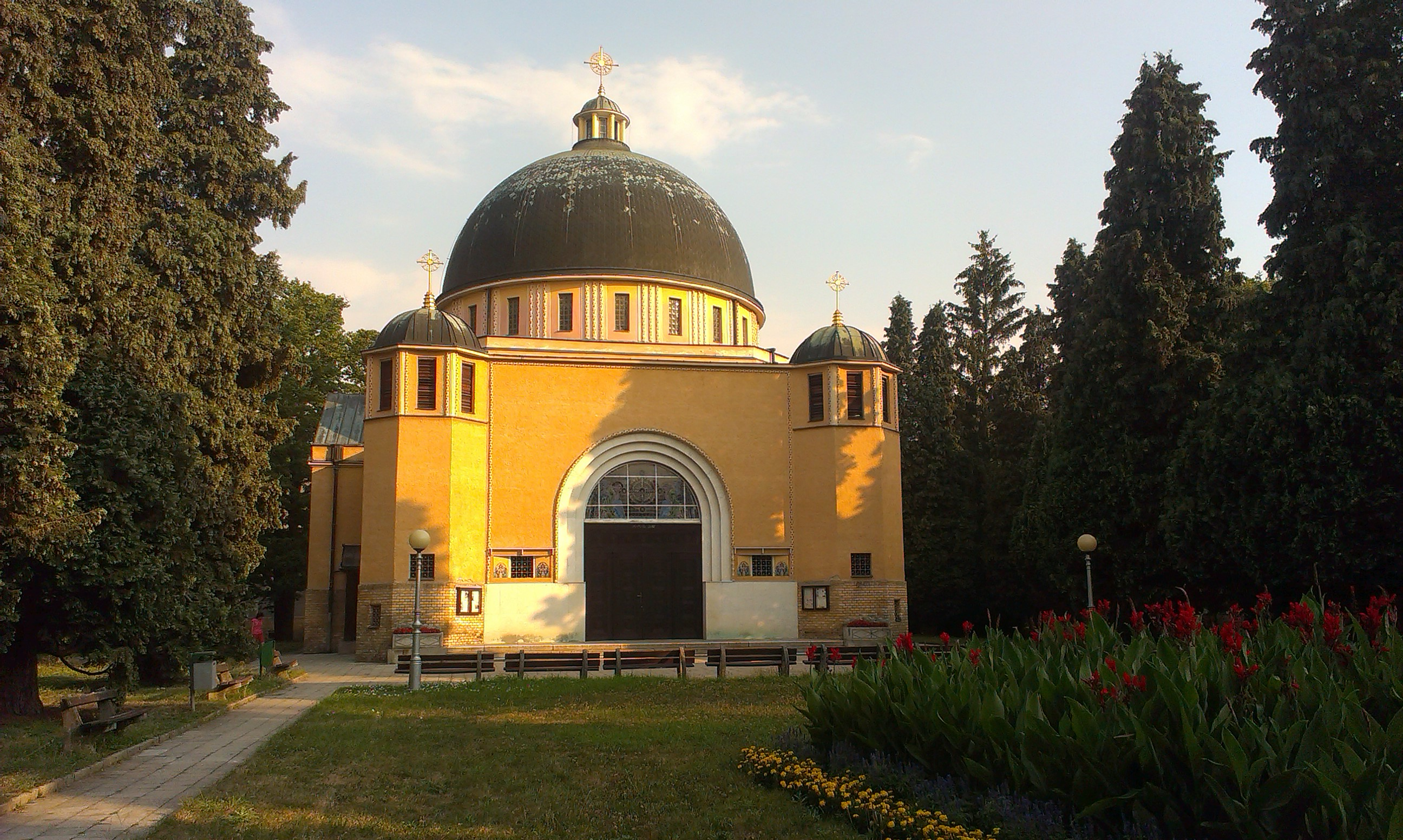 Psychiatrická léčebna, Havlíčkova 1265/50, Kroměříž. Pavilon 28 - kostel sv. Cyrila a Metoděje.